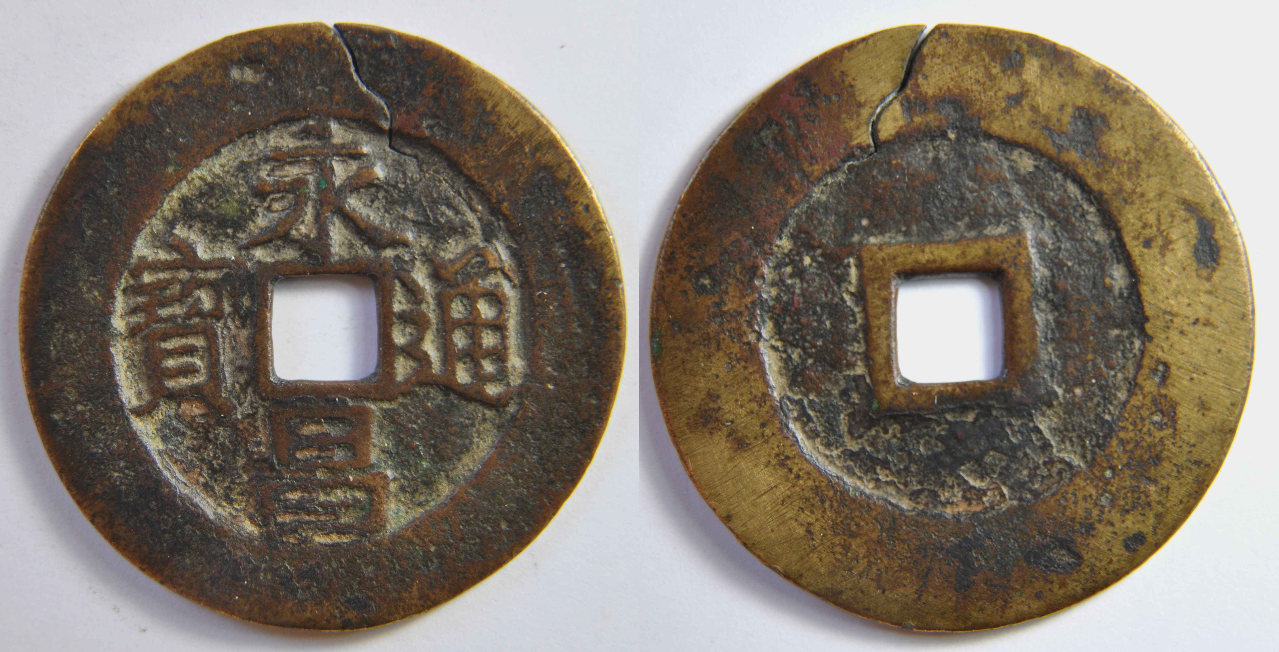 Une monnaie de 5 sapèques (5 cash) de Li Zicheng, un chef rebelle aussi connu sous le nom de Chuang Wang, qui s'est autoproclamé roi à Xian dans la Shaanxi en février 1644. Il prend le titre dynastique de Shun avec le nom d'ère de Yong Chang et commence à fabriquer des monnaies. Il avance vers Pékin en avril 1644 mais est repoussé par les Mandchous en juin. Il fait retraite vers l'Ouest et est tué vers juin ou juillet 1645. A/ Yong Chang tong bao (Monnaie courante de Yong Chang) Yong est écrit avec deux traits supérieurs au lieu d'un point puis un trait et se lit donc 'Er Shui', rebord large. R/ Vide Dimension : 37.68 mm Poids : 9.7 g. Référence : H21.4 ; S1325 Rareté : 10 (Monnaie commune) Remarque : La monnaie est brisée à 0:00 (fente).